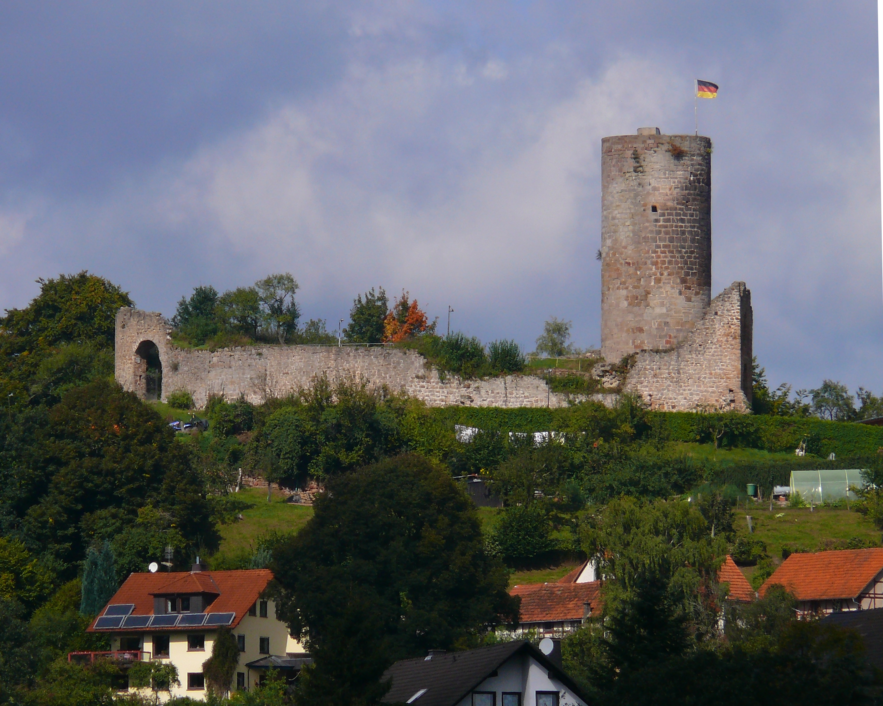 Burgruine Mellnau, Wetter (Hessen)